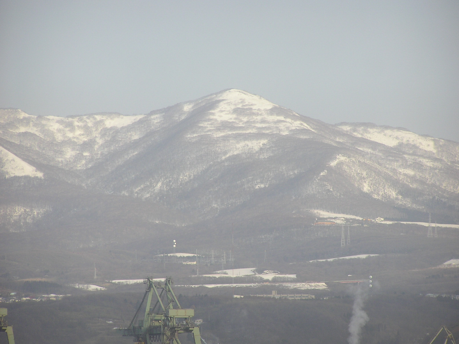 Mt.Muroran-dake室蘭岳(Mt.Washibetsu-dake鷲別岳),Hokkaido,Japan